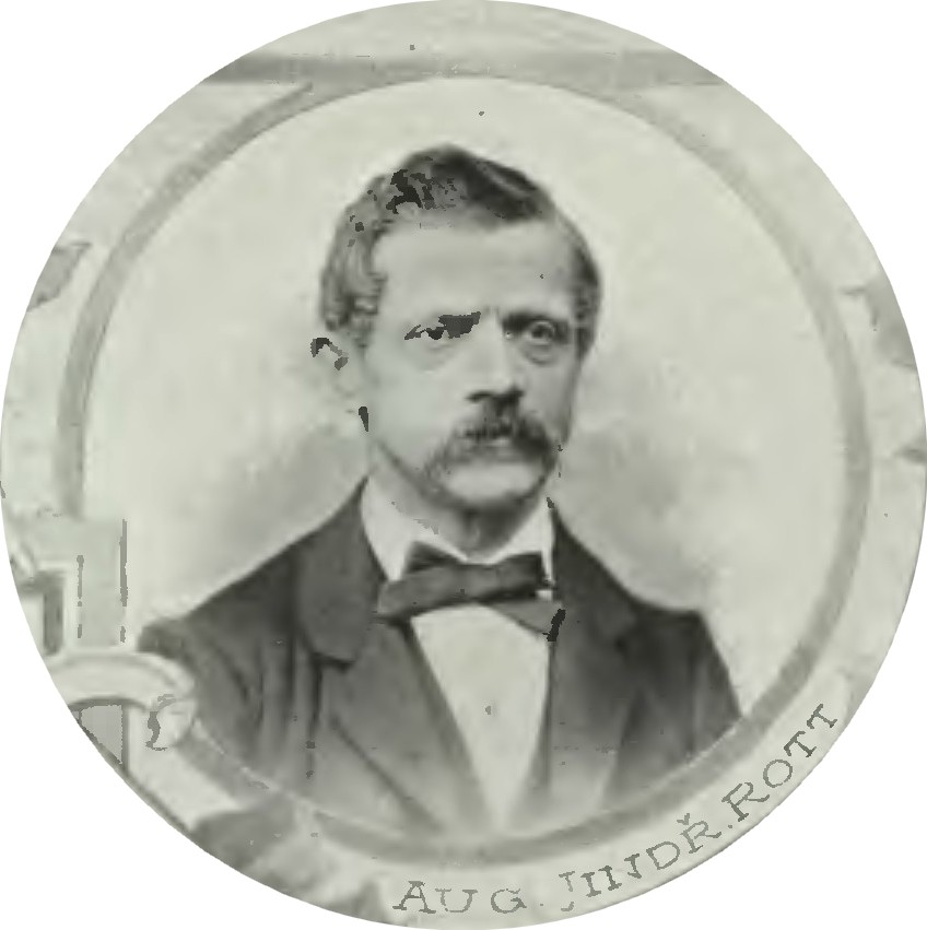 Portrét – August Jakub Rott (1815-1868), Český podnikatel, výrobce hudebních nástrojů.